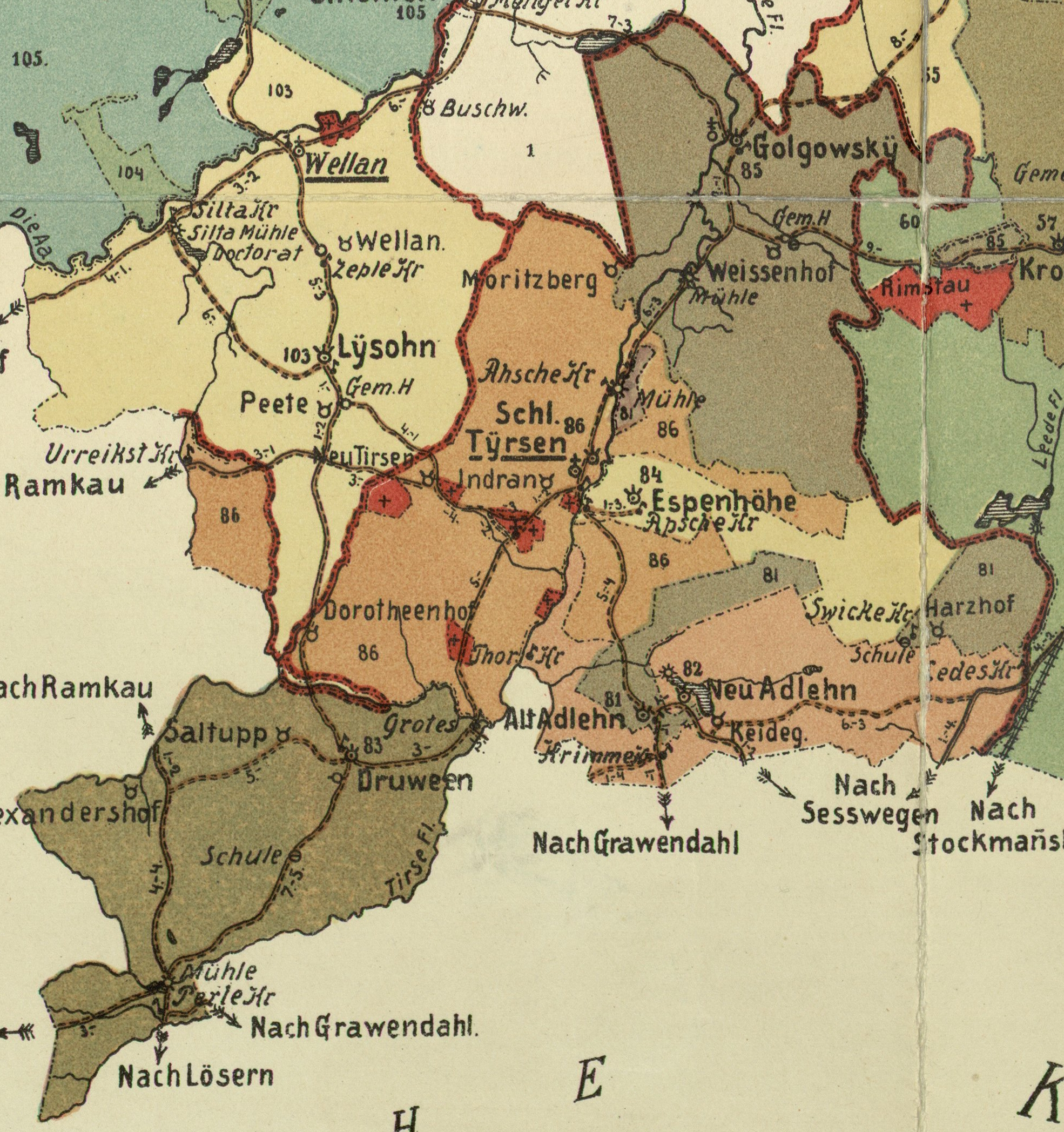 Tirza kihelkonna mõisad 1904. aasta kaardil.